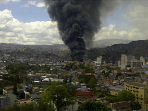 Incendio en los mercados Colón, San Isidro en Comayaguela.